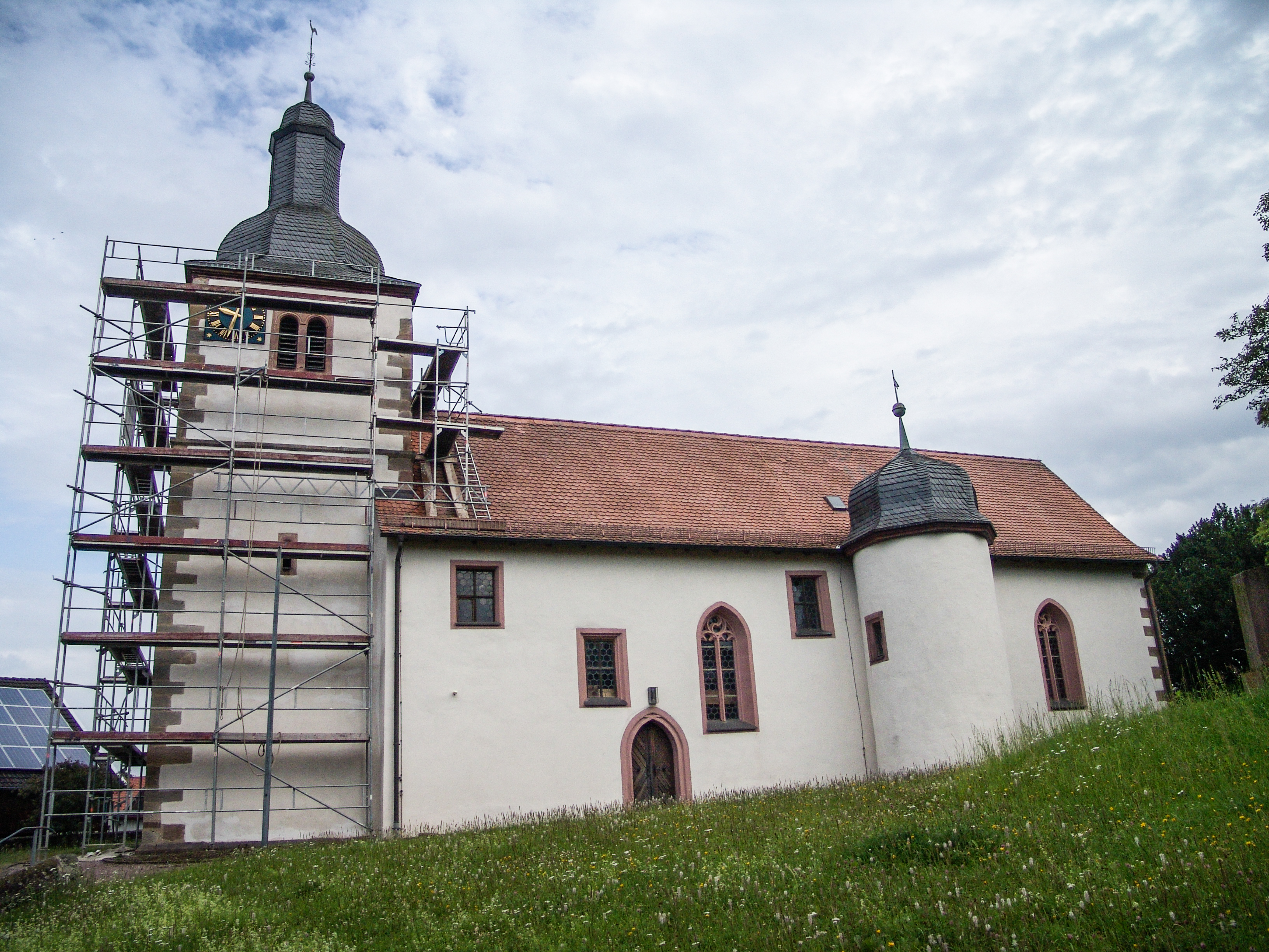 Detter, Evangelische Kirche